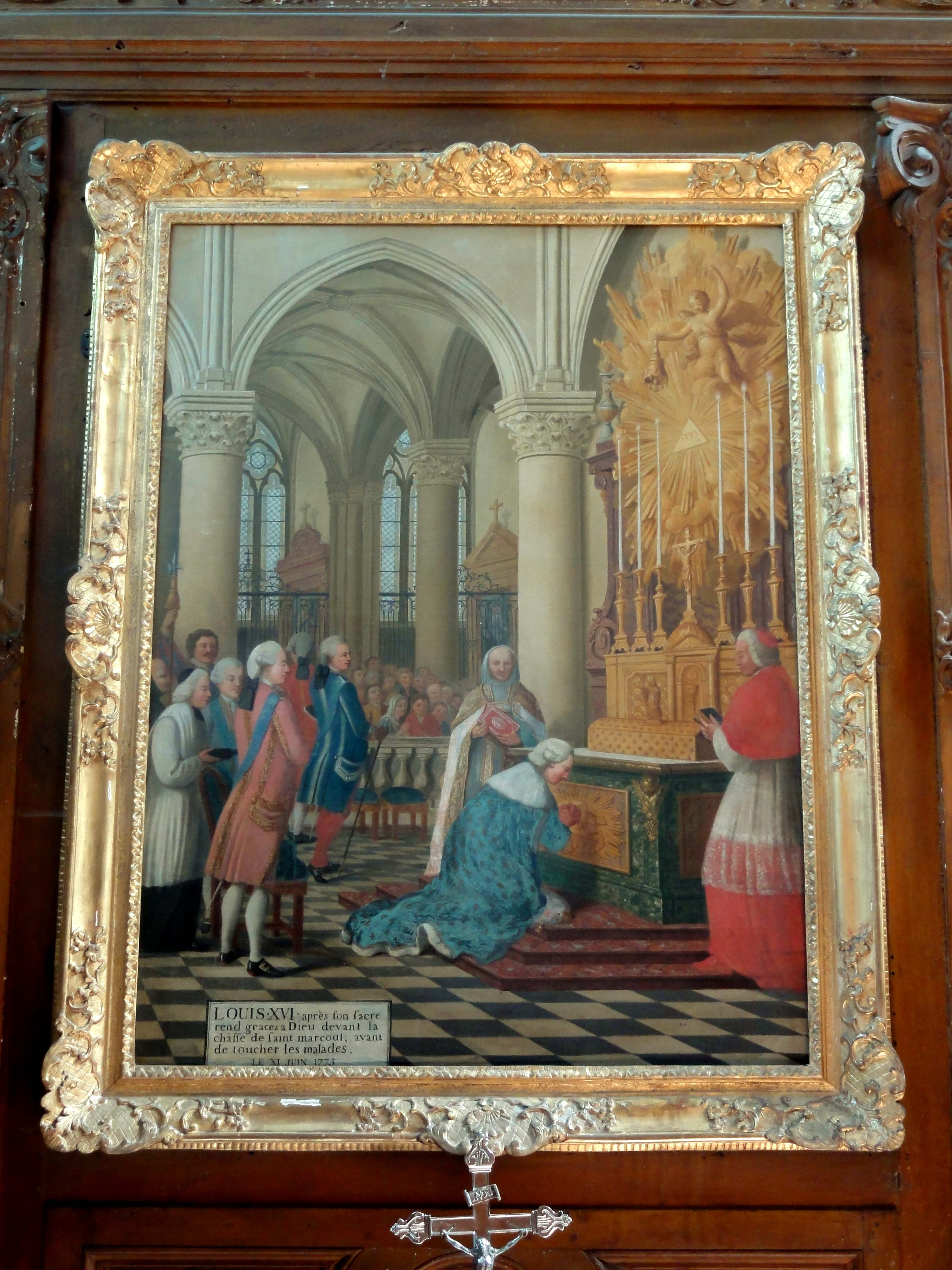 Tableau - Louis XVI, après son sacre, rend grâce à Dieu.